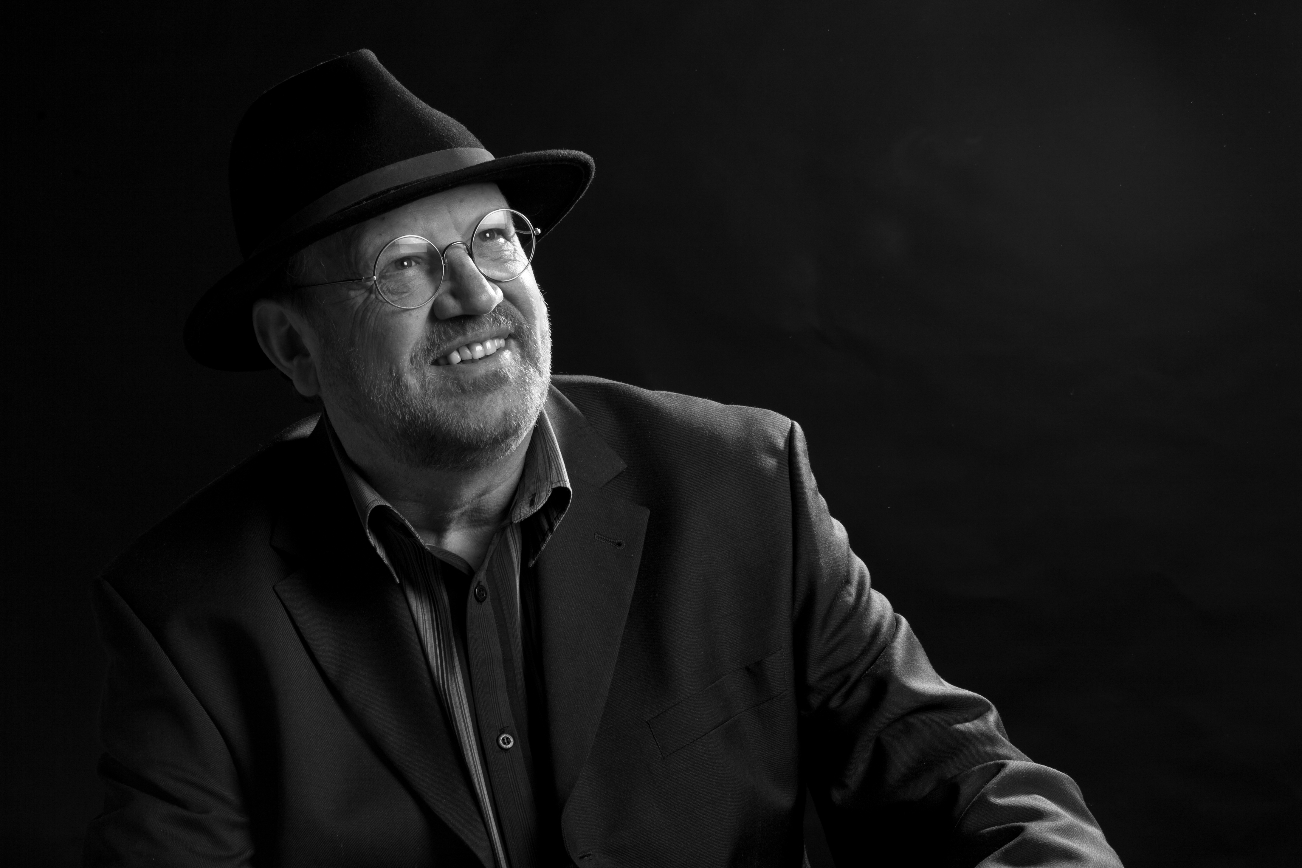 Henry Euler - Maler und Autor